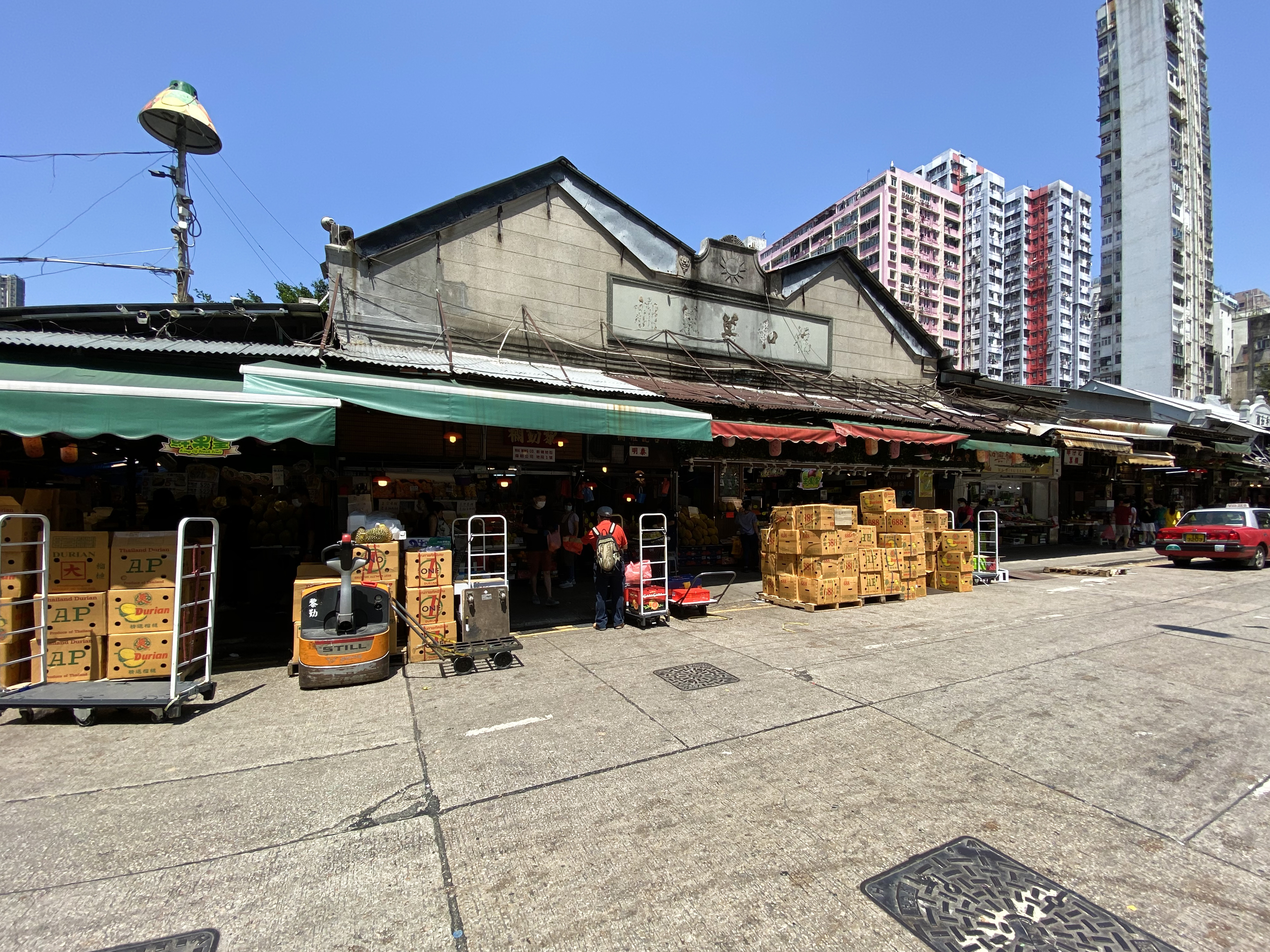 Yau Ma Tei Fruit Market